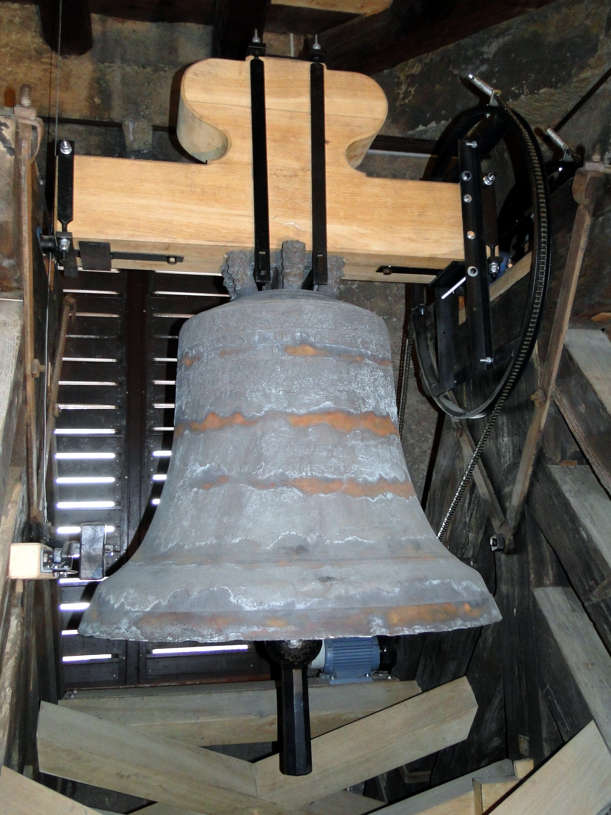 Die große Glocke der Sophienkirche, heute Teil des Geläuts der Emmauskirche in Kaditz, gegossen von Andreas Herold